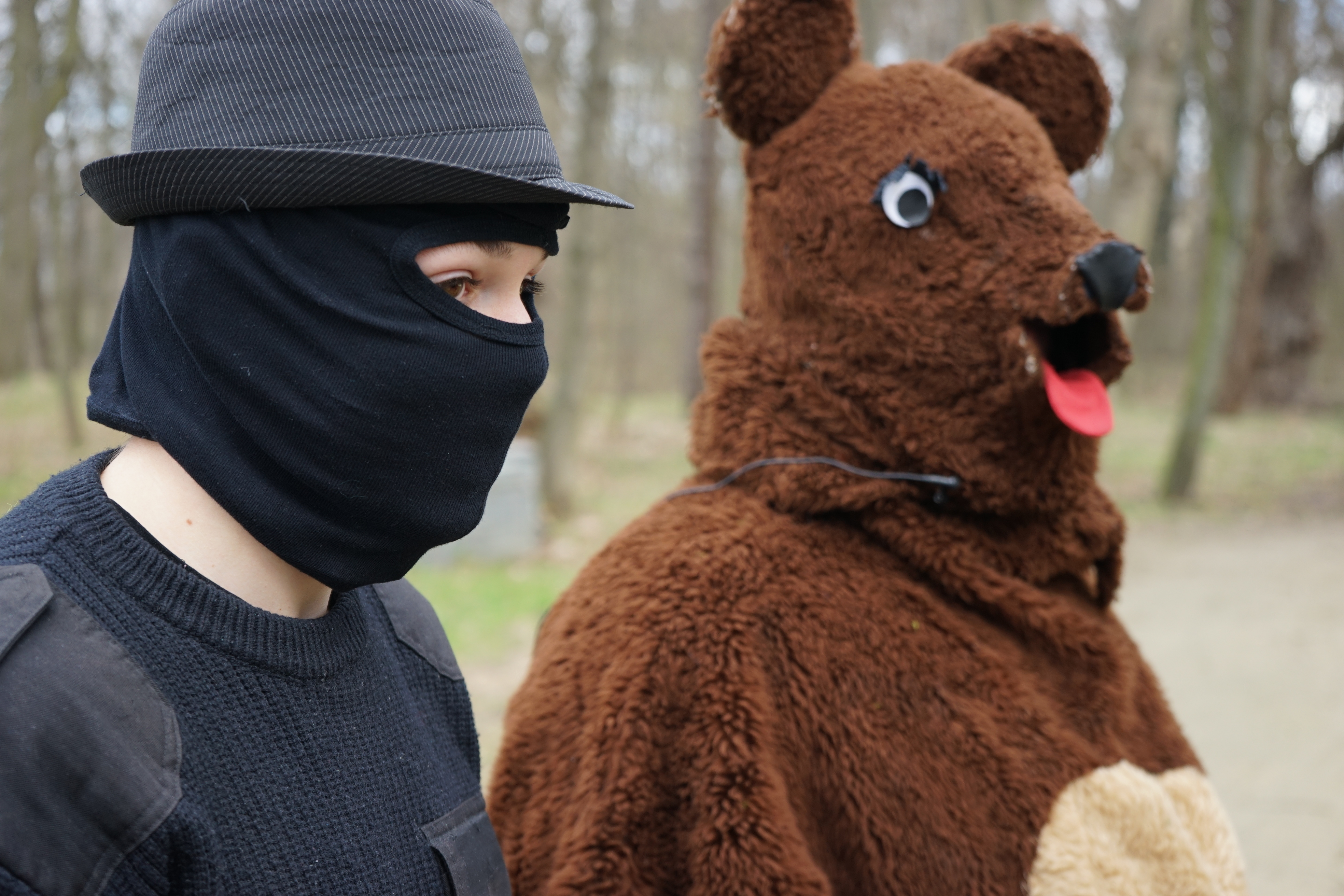 Siwki w Chobienicach odbywają się co roku w pierwszy dzień świąt Wielkanocnych. Grupy przebierańców zatrzymują samochody pobierając opłaty, grają i śpiewają na ulicach malując sadzą twarze mieszkańców, smagają rzemieniami łydki przechodniów. Zbierają dary i rozmawiają z chętnymi do udziału mieszkańcami. Pochód trwa od godzin południowych do późnego popołudnia.